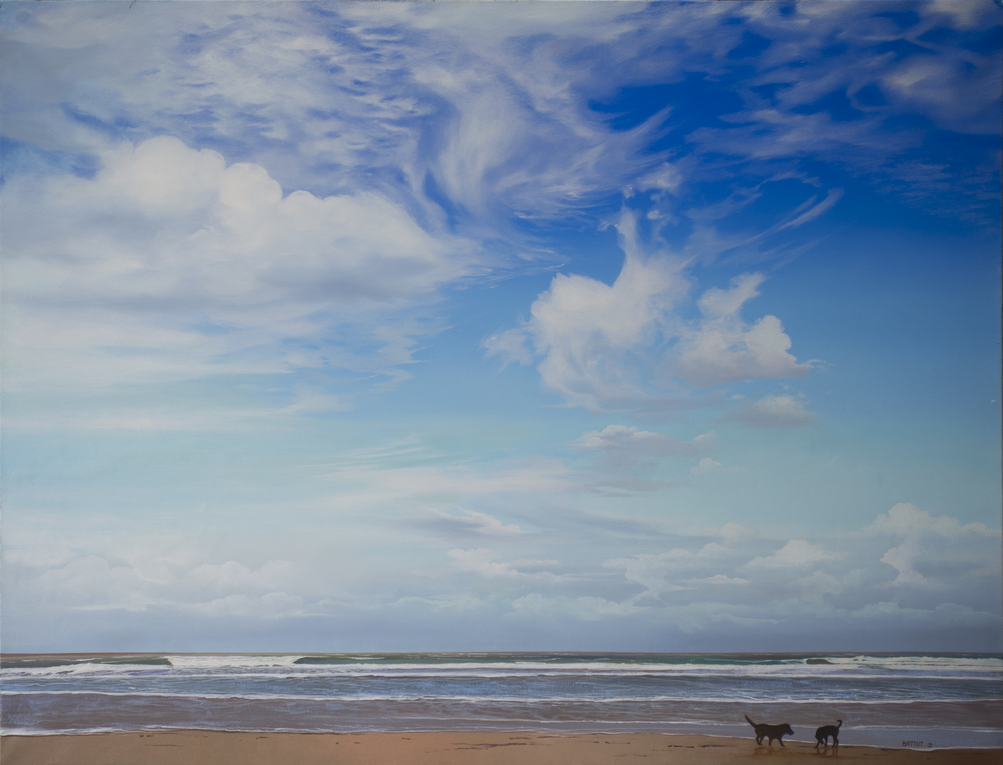 "Le Touquet" 50x65 cm